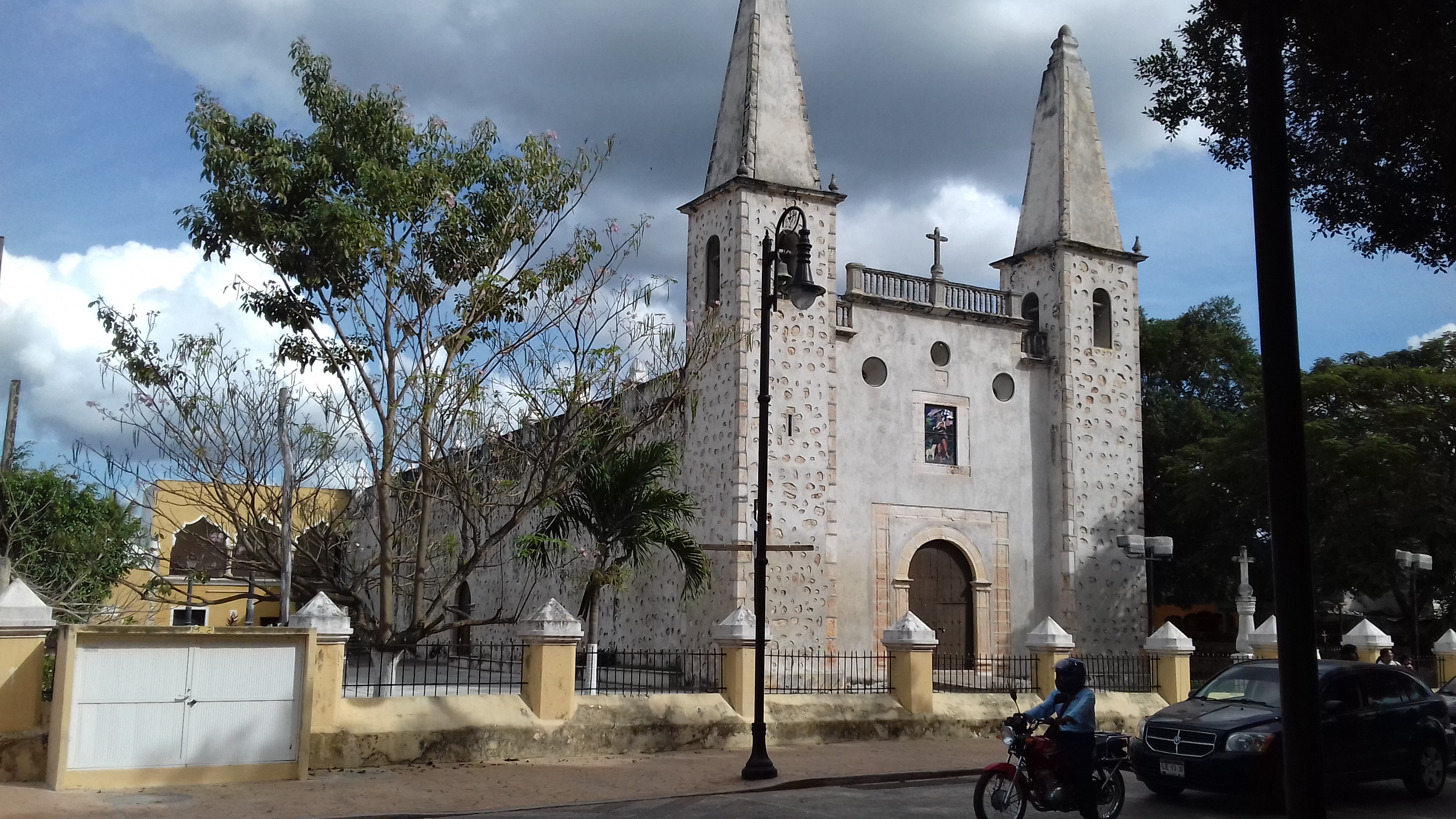 Iglesia Católica San Juan Valladolid Yucatán 2018